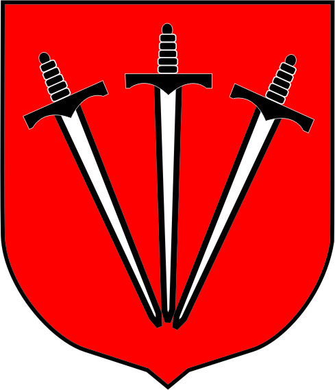 Herb miasta Zator